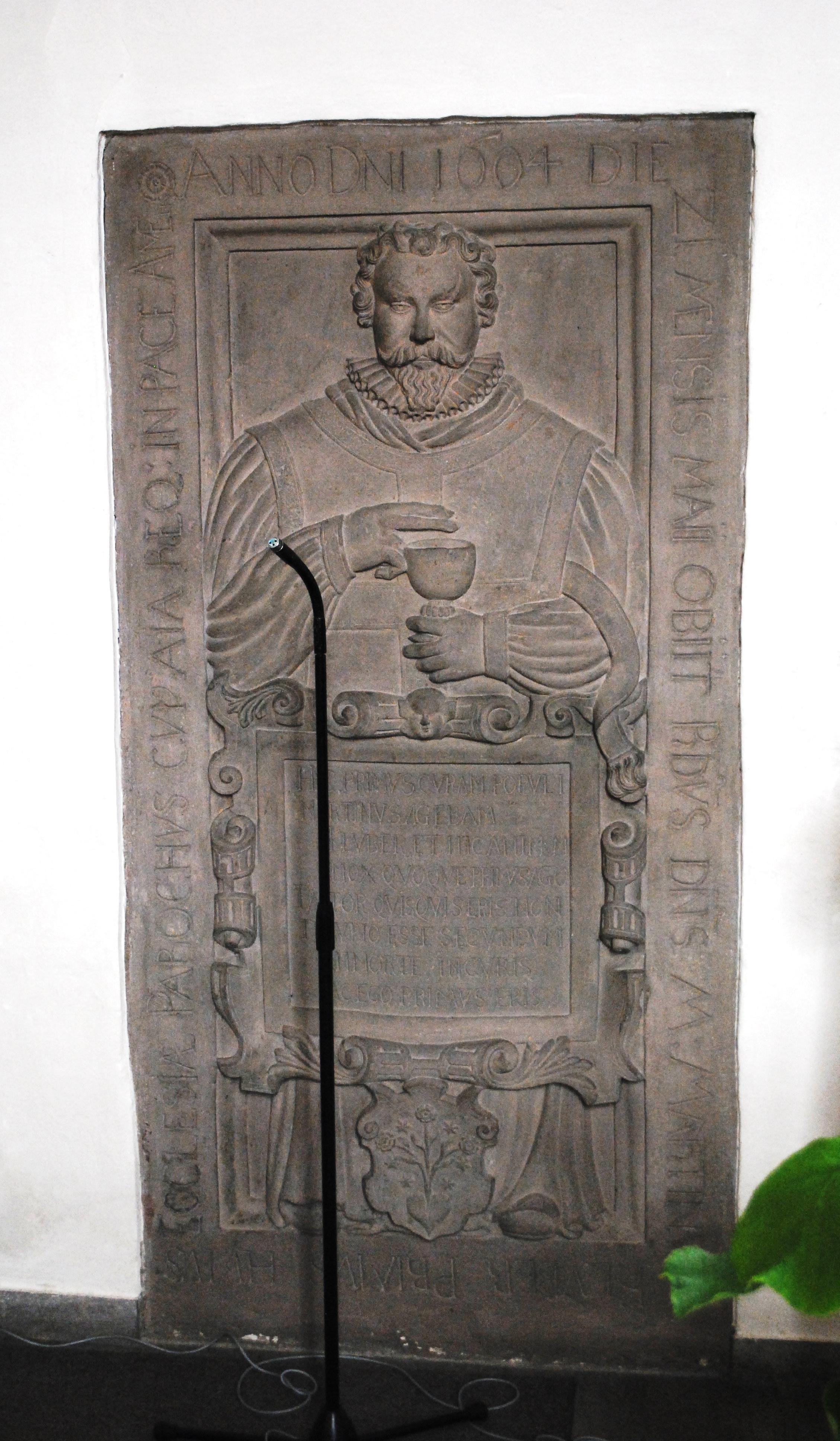 Epitaph, Kirche, Escherndorf, D-6-75-174-198